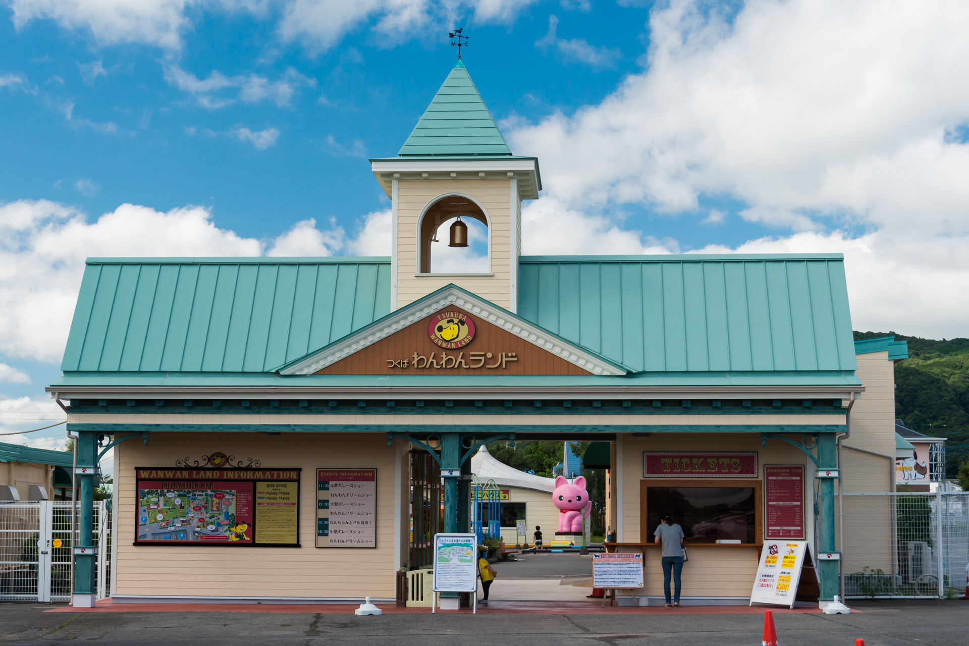 つくばわんわんランド（エントランス） 2017年8月改修